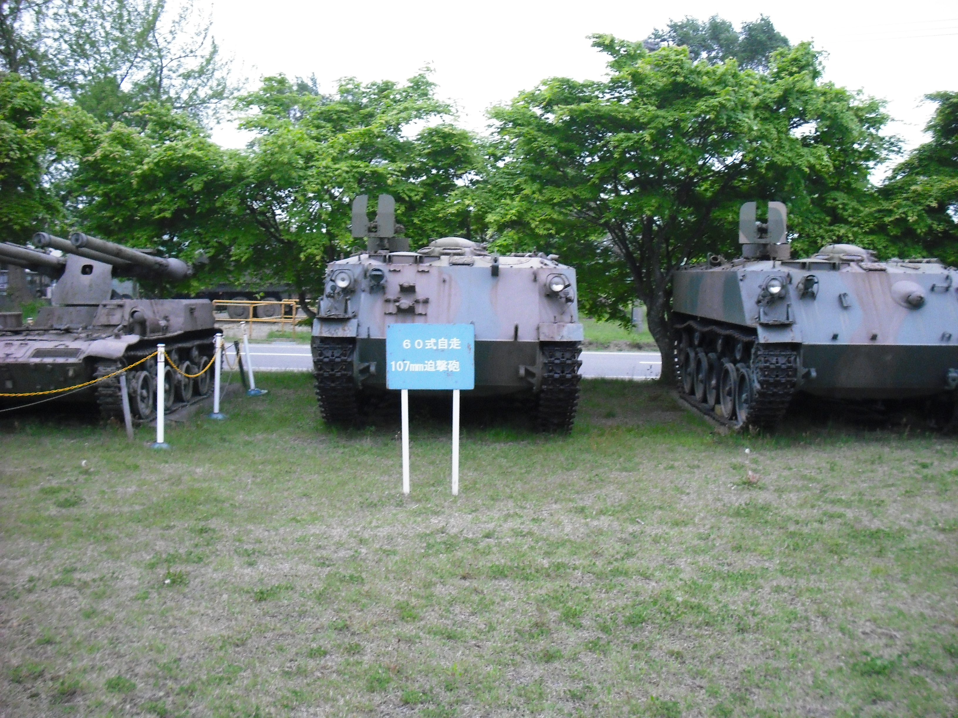 陸上自衛隊東千歳駐屯地 60式自走107mm迫撃砲